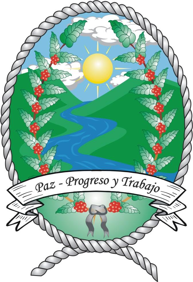 Escudo Genova